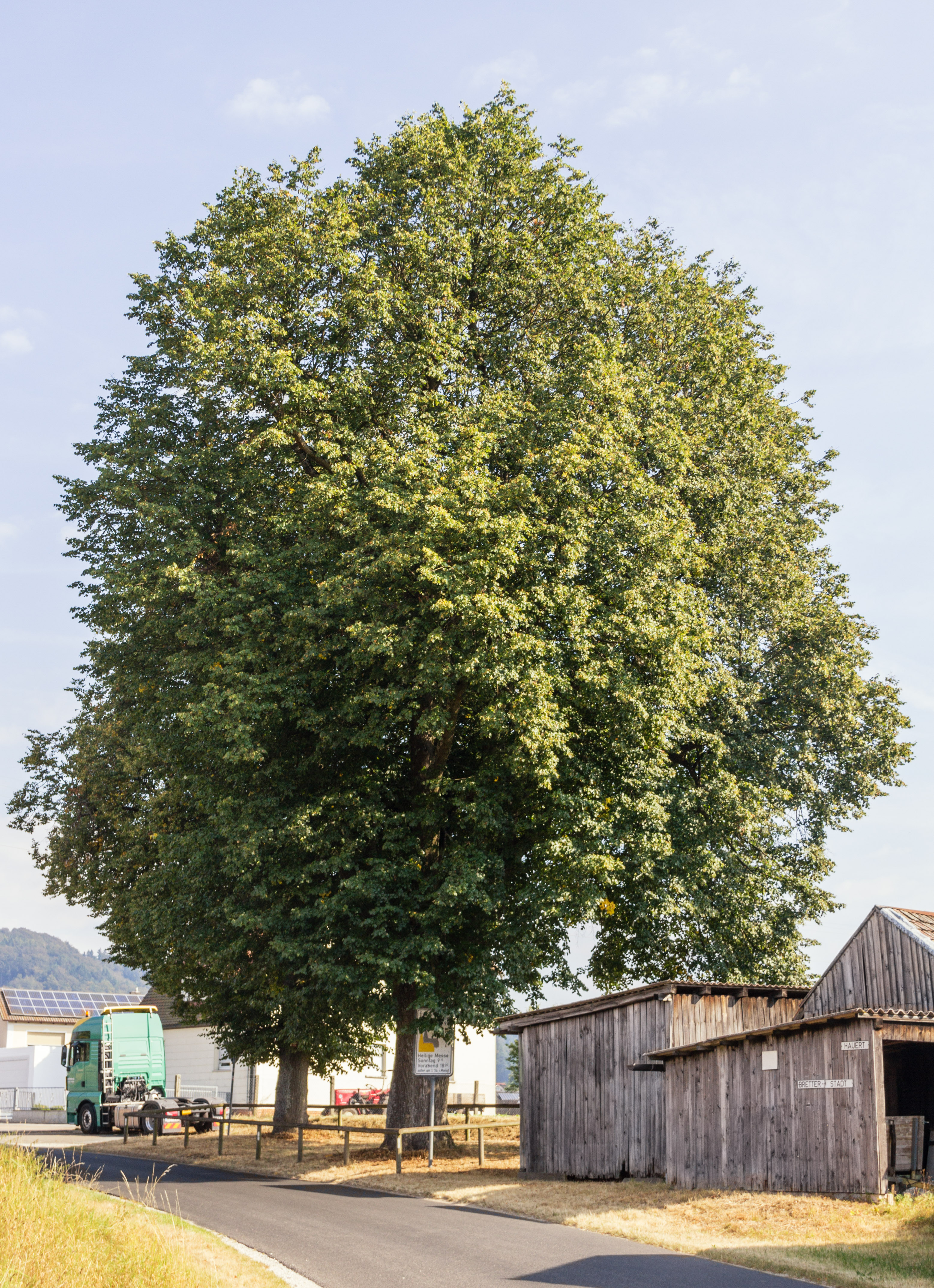 Holzplatzlindem, Leinburg, Naturdenkmal